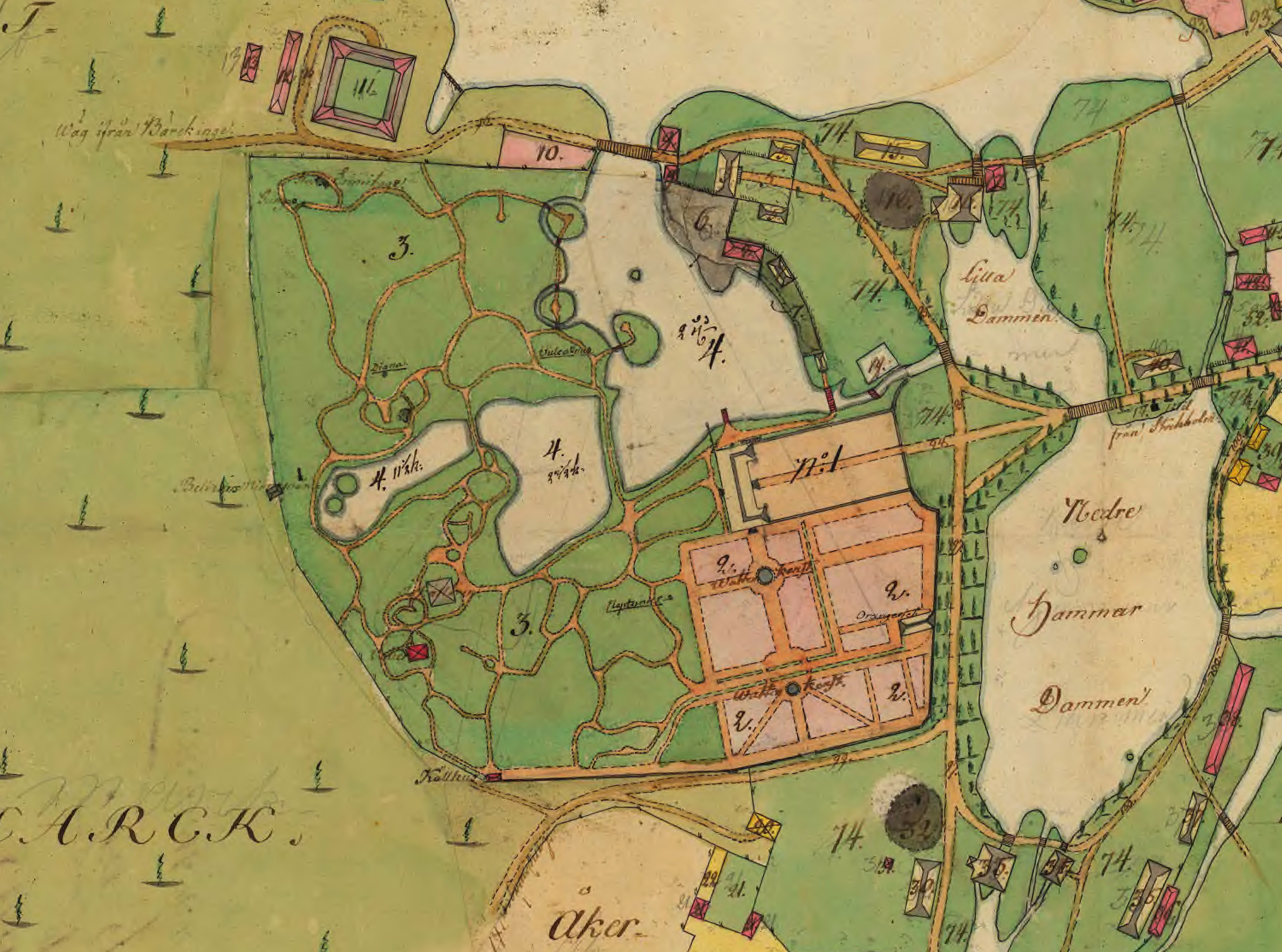 Del av karta över Forsmarks herrgård och engelska trädgården